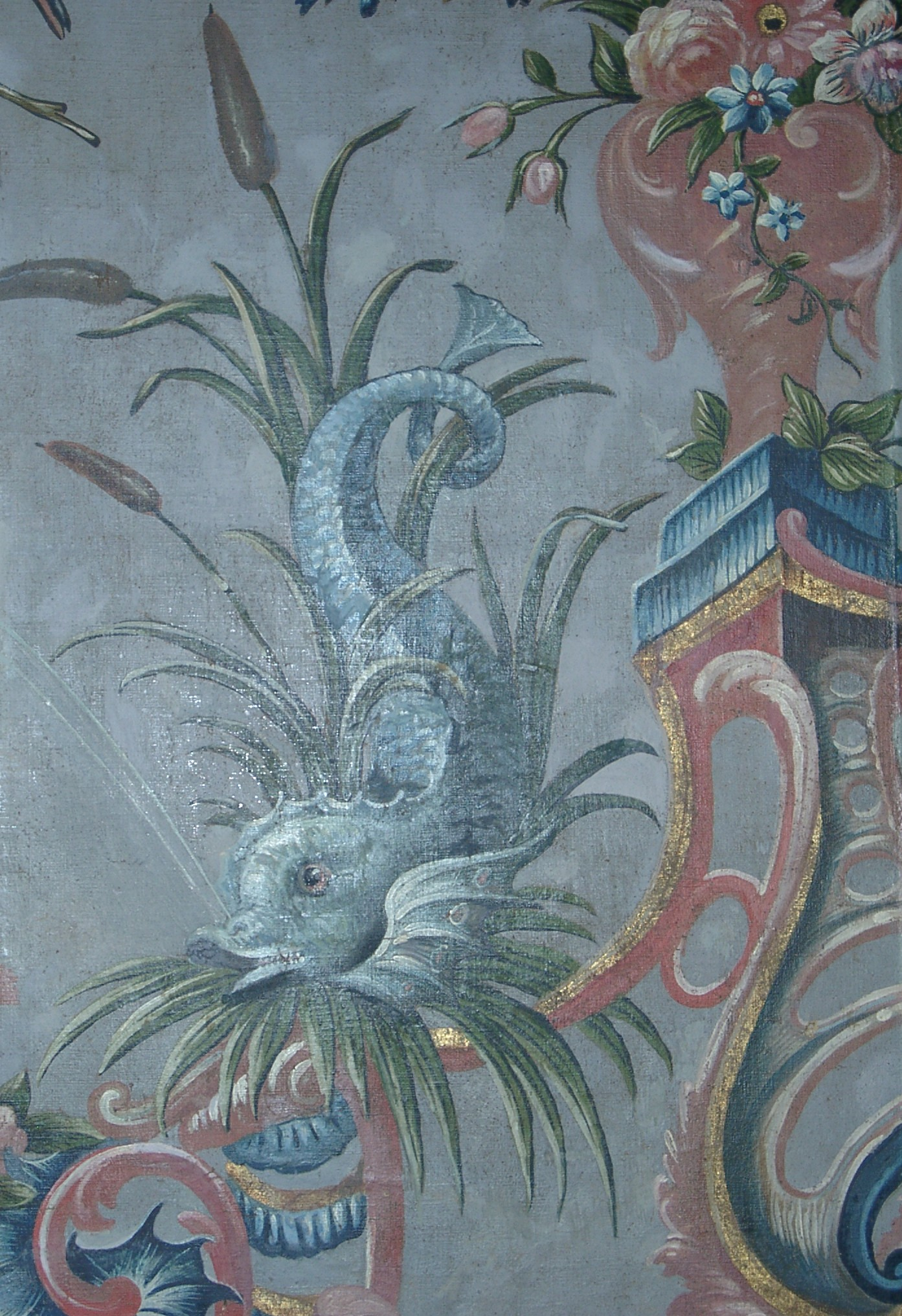 Detail rococo wallpaper in Museum Geelvinck-Hinlopen Huis, Amsterdam